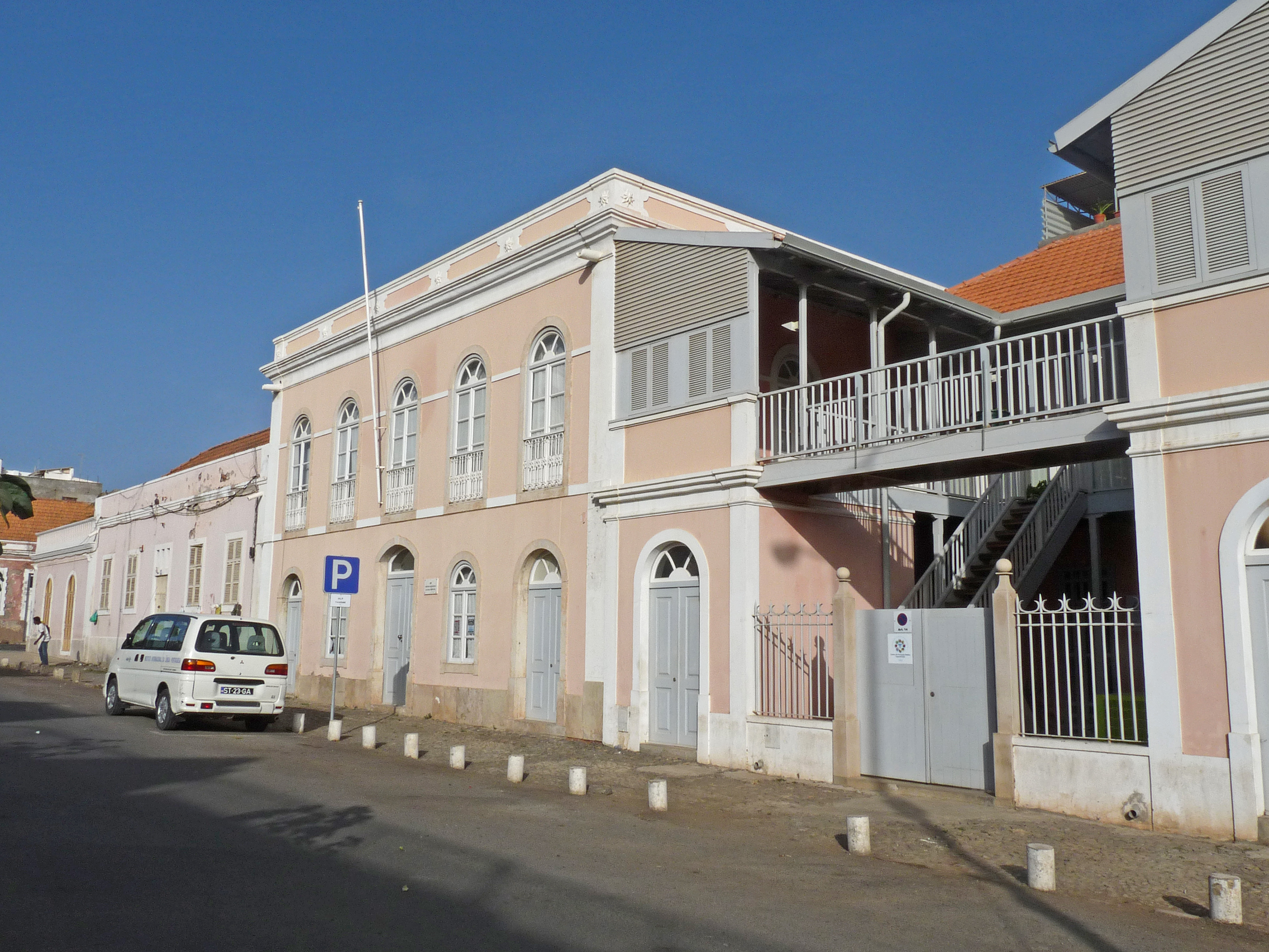 Praia (Cap-Vert) : Instituto Internacional de Língua Portuguesa (IILP)